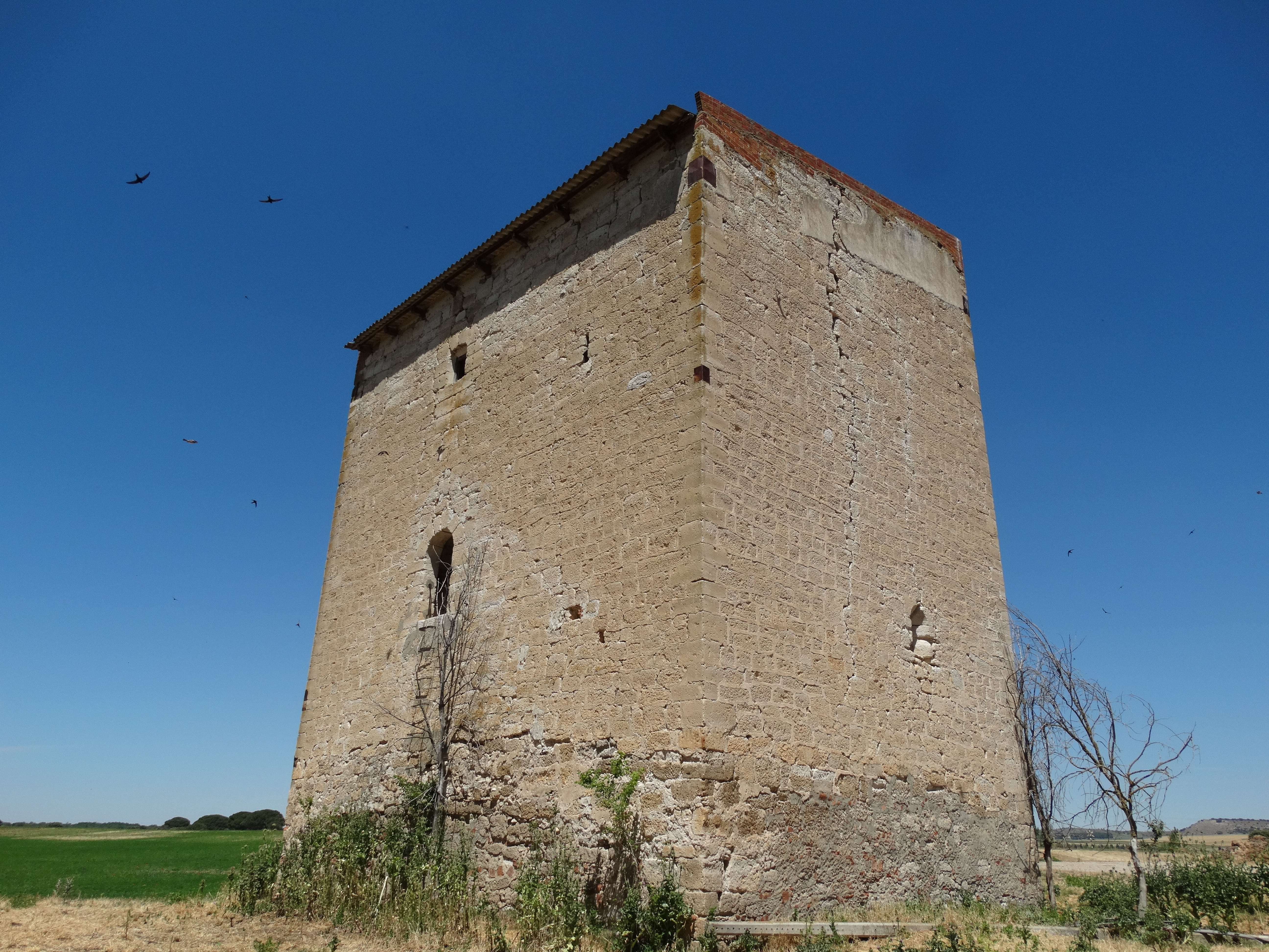 Valladolid, España. Torreón de defensa en el despoblado de Fuentes de Duero. Es de planta cuadrada; carece de almenas que fueron sustituidas en alguna restauración por un simple tejado. La foto muestra el lado sur y el este. Se supone que fue una torre de defensa para salvaguardar los bienes de la comunidad agrícola del lugar y además un espacio para guardar el grano.